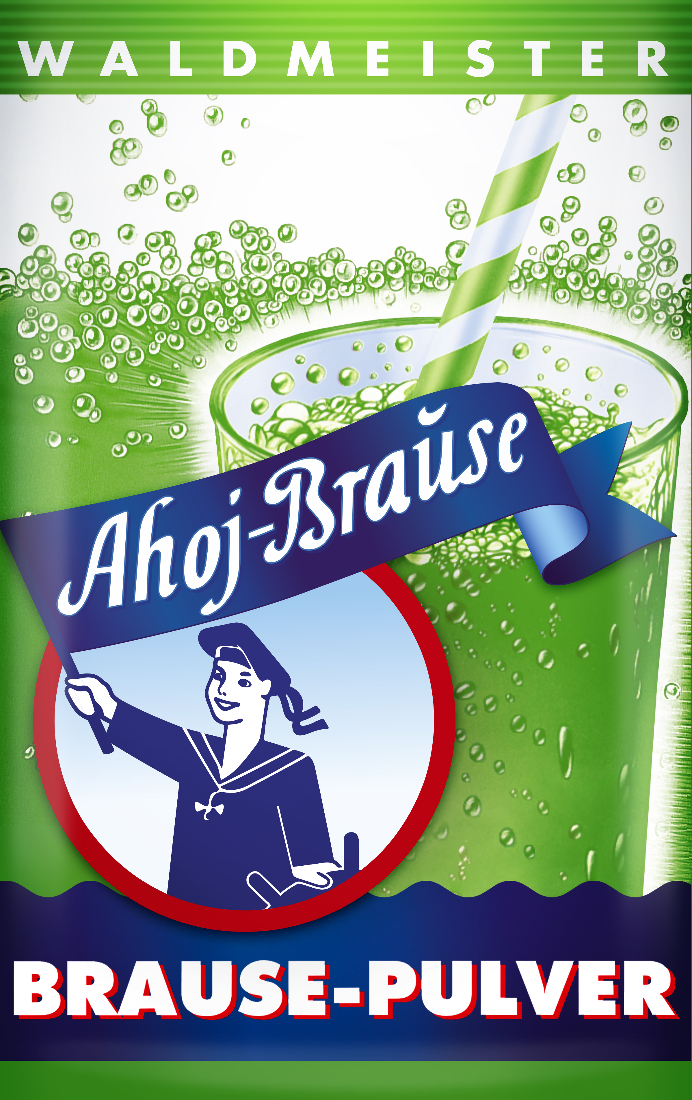 Ahoj-Brause, Geschmacksrichtung Waldmeister